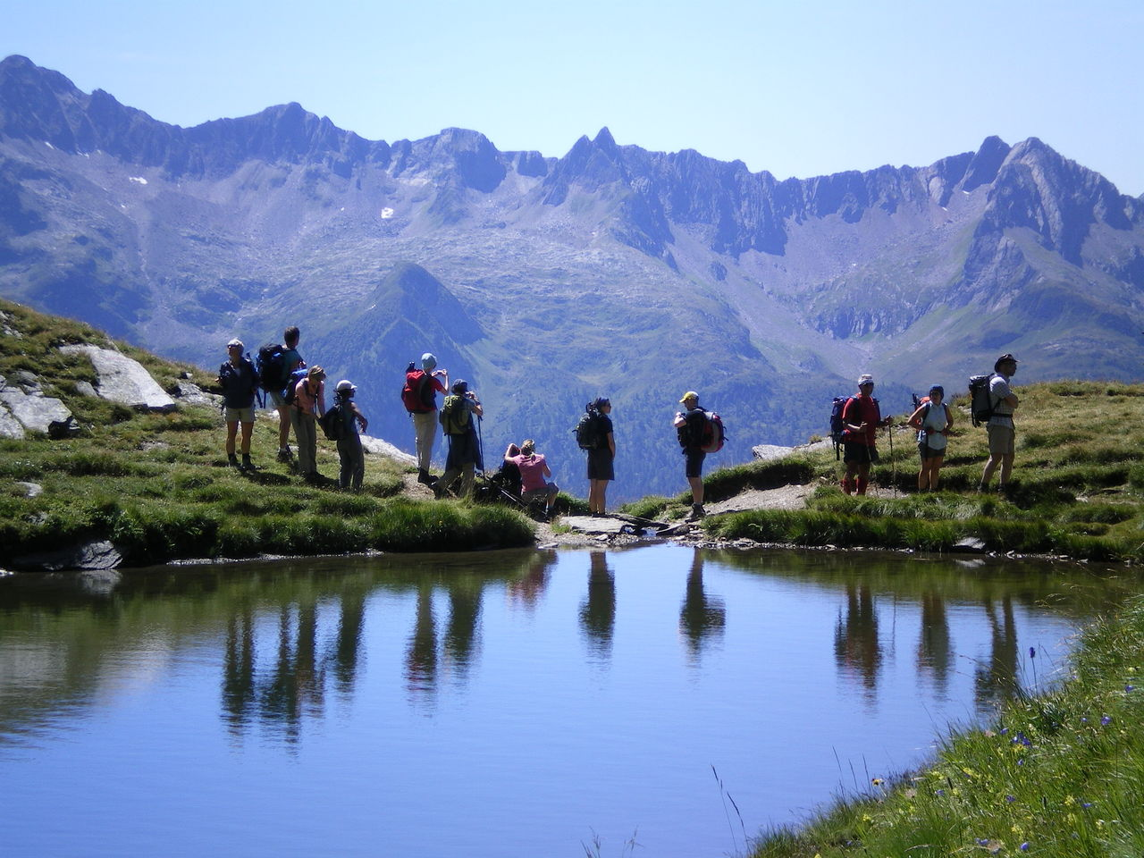 Hochalpine Wanderung - Abstieg von der Cadlimohütte Richtung Lago Ritom / Ambrio Biotta (Schweiz, Kanton Graubünden)